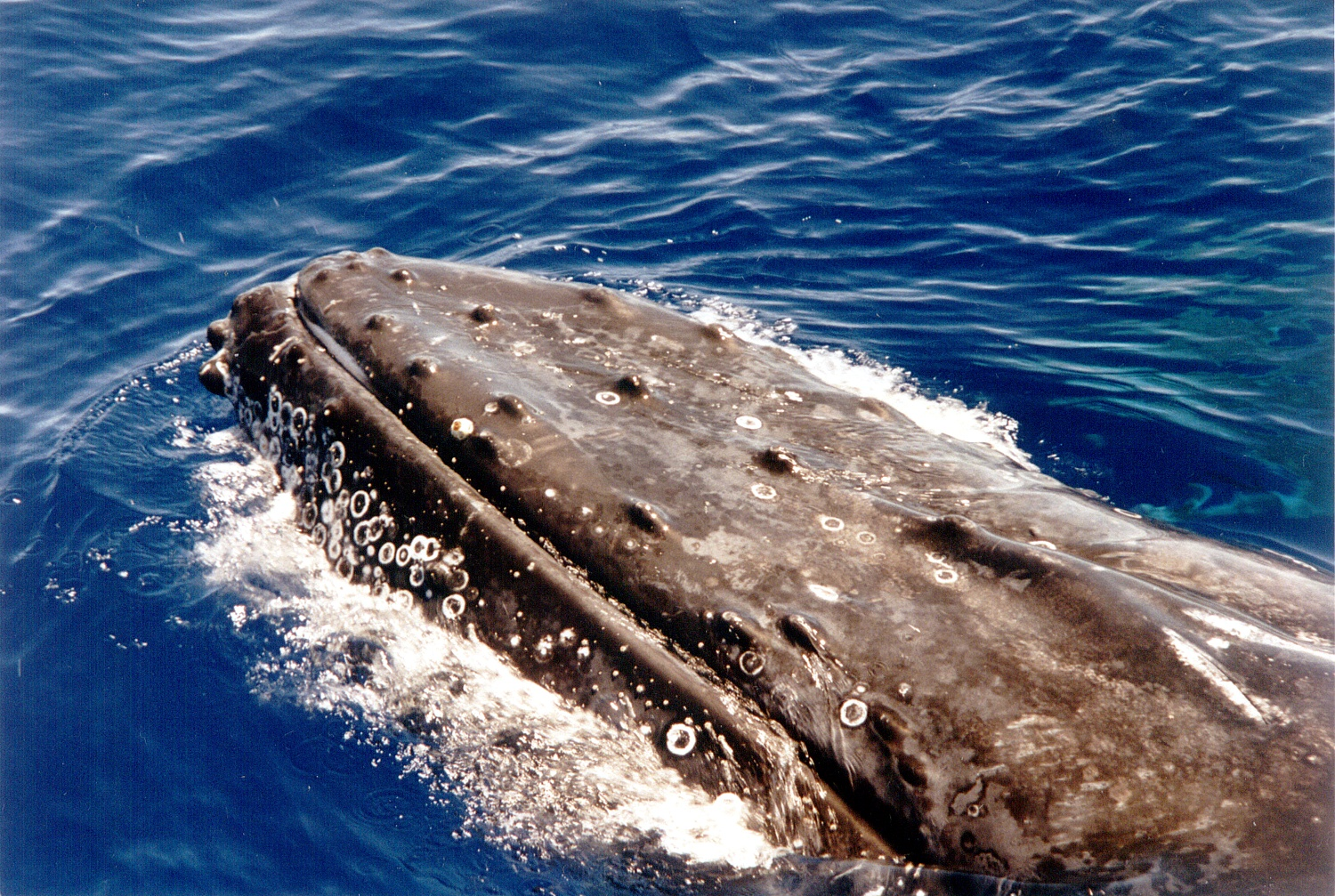 Nahaufnahme des Mauls eines jungen Buckelwals (Megaptera novaeangliae) – Vgl. Buckelwal Schwanzflosse.jpg (Fluke des selben Wals)